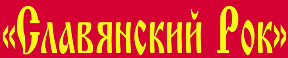 Емблема міжнародного рок-фестивалю «Слов'янський рок»